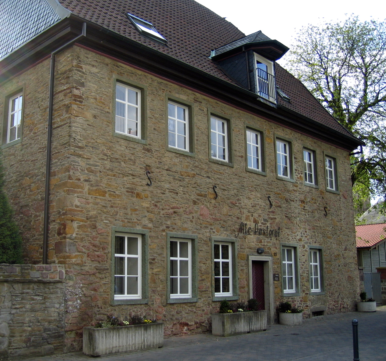 Description: "Altes Pastorat", denkmalgeschütztes barockes Steinhaus (1666) in Menden (Sauerland). Source: selbst fotografiert Date: 25. Apr. 2006 Author: Asio otus